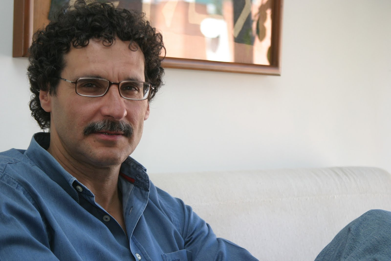 Fotografía de Morábito. Autor desconocido.